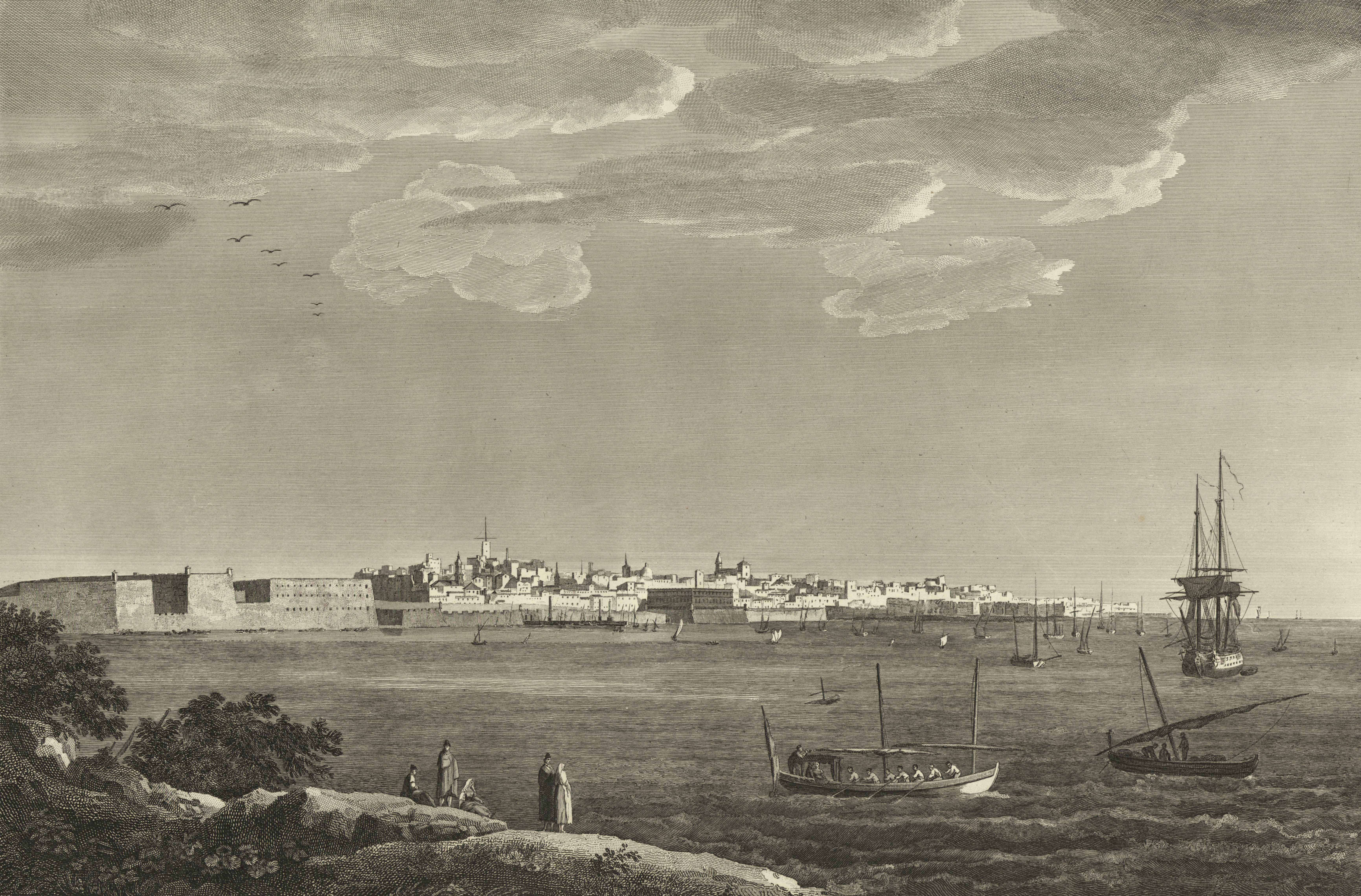 Vista general de Cádiz.